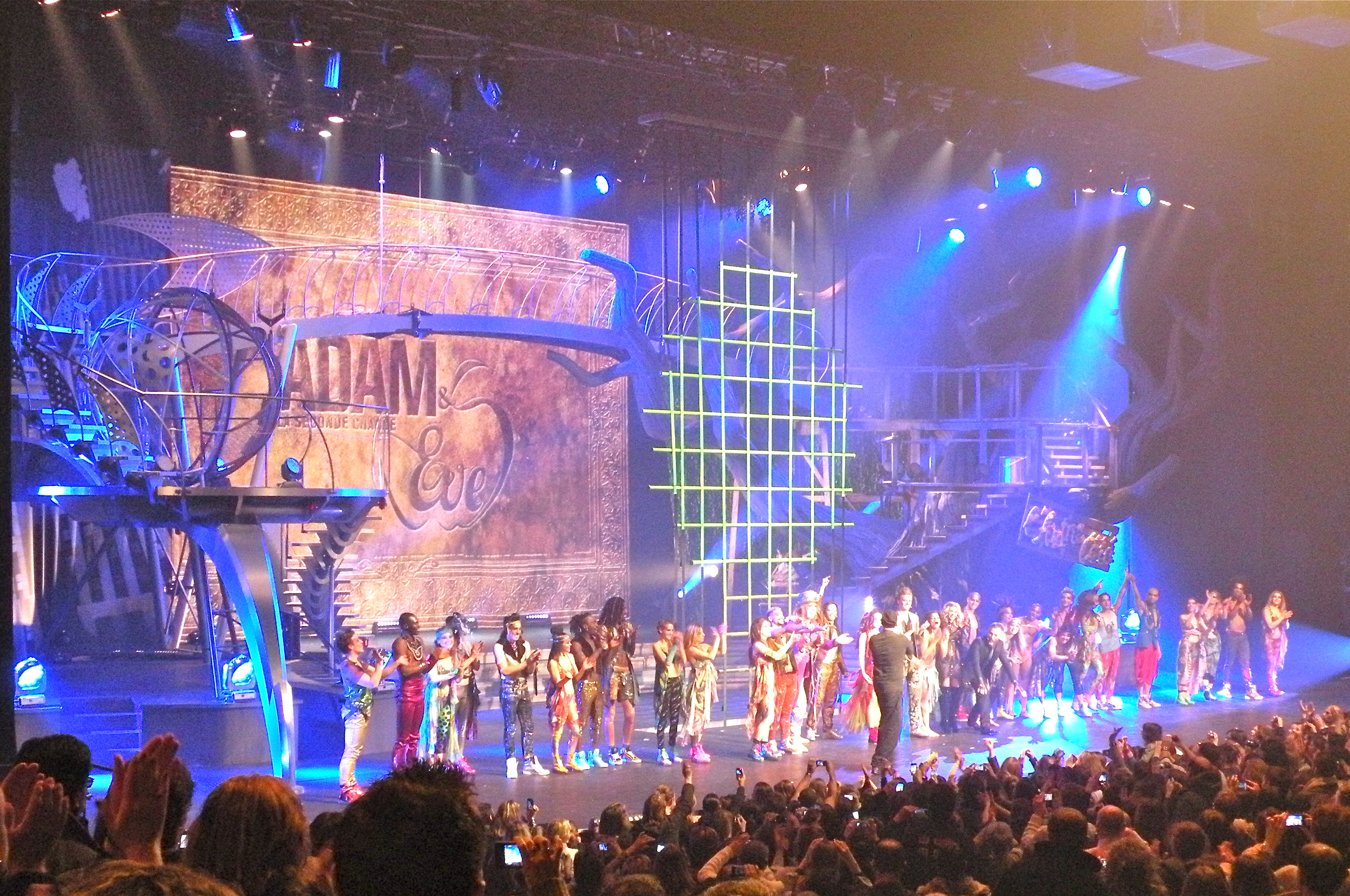 scene d'adam et eve